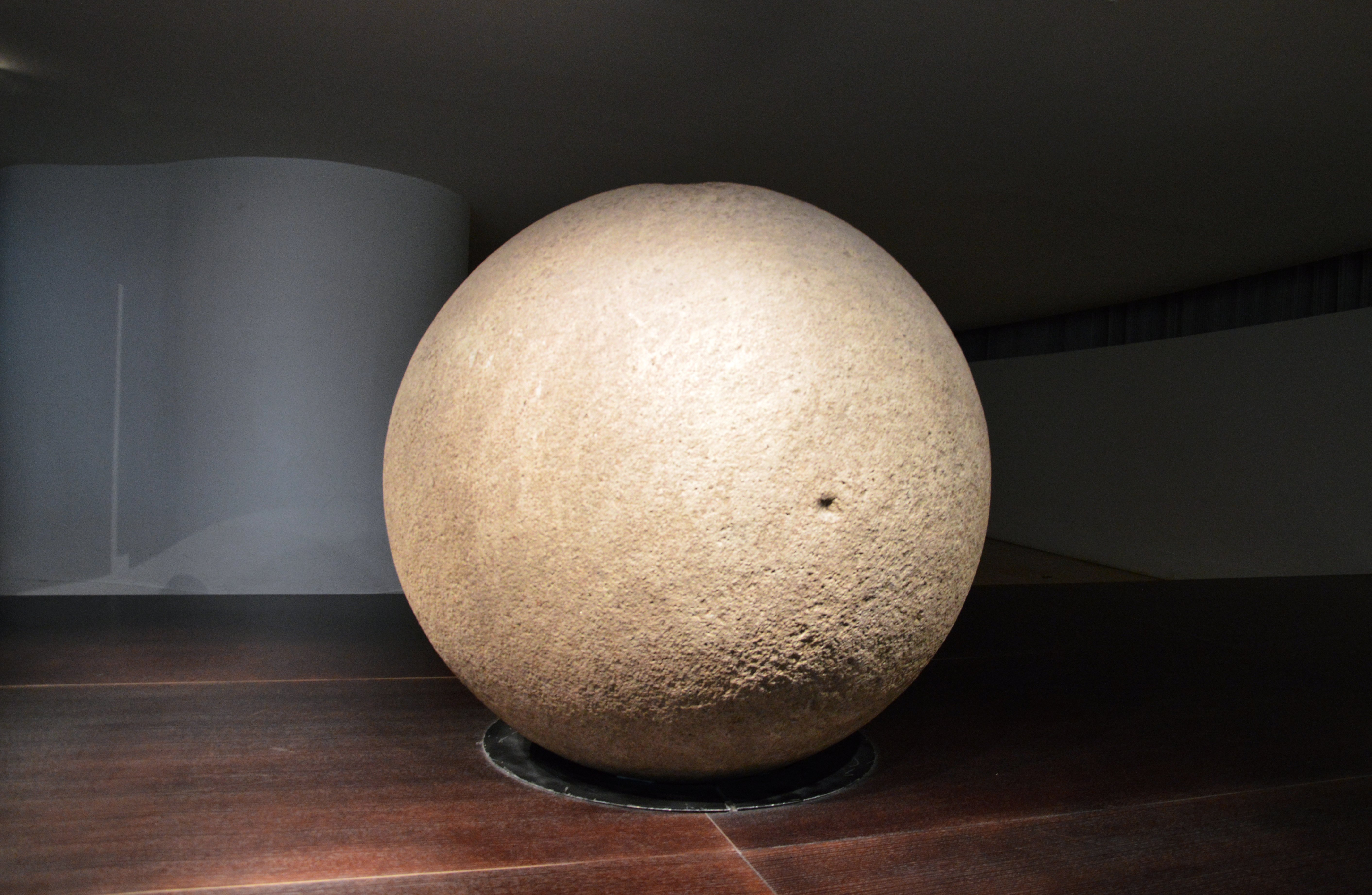 Sphère de pierre. Costa Rica, région du Diquís. 800-1500. Prêt temporaire du Museo Nacional de Costa Rica (n° 28-439).